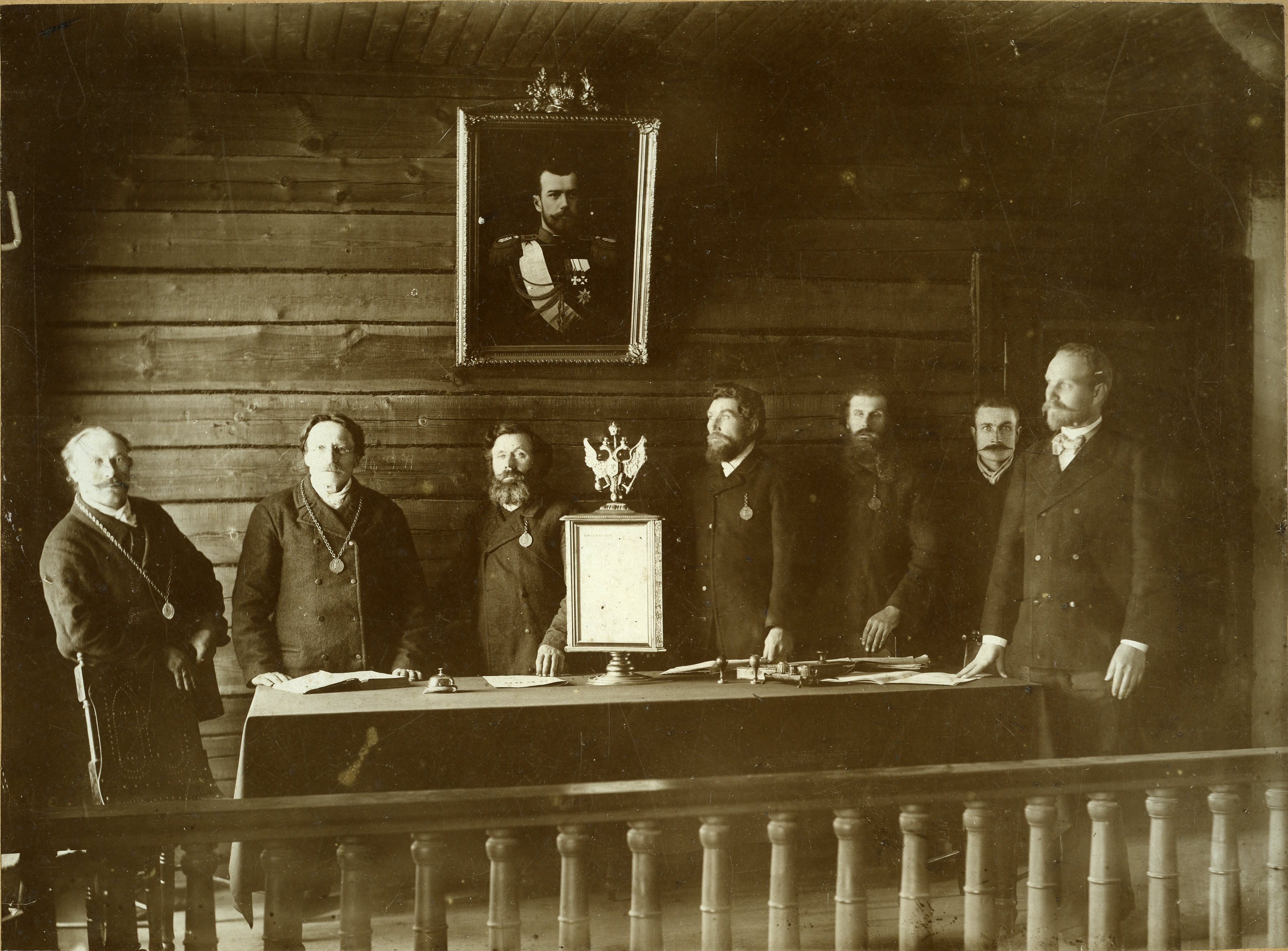 Keila vallamaja kohtusaal